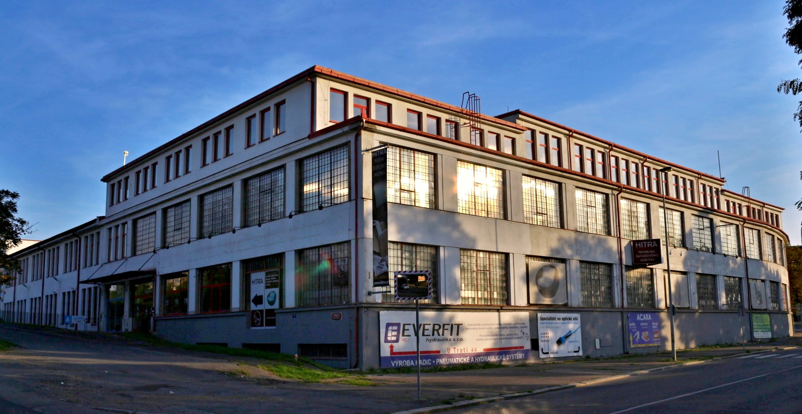 Strašnice bývalá továrna motocyklů Jawa